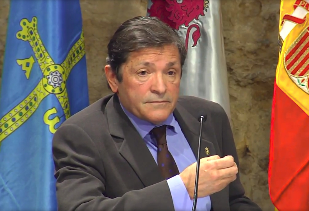 Intervención del presidente de Asturias. Reunión Castilla y León, Aragón, Asturias y Galicia. León. 2018.